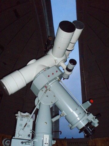 Refraktor typu coudé